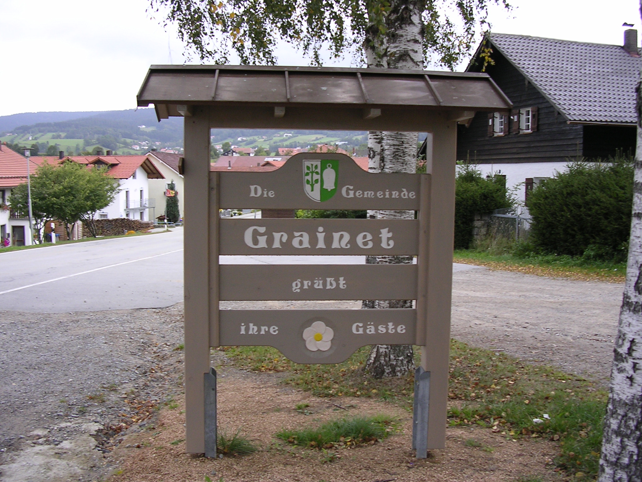 Grainet Begrüßungsschild